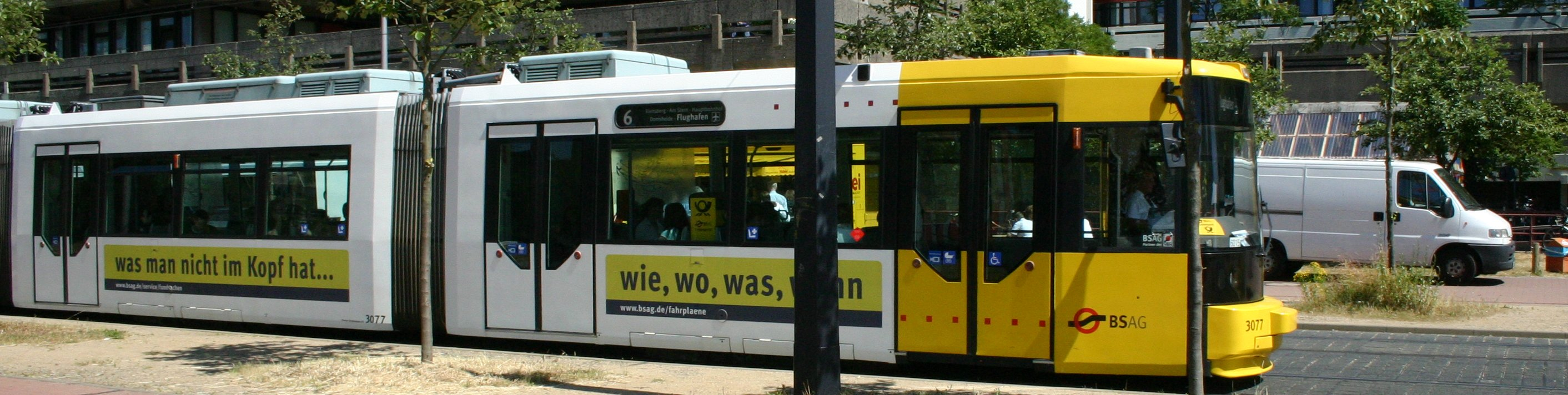 This image was copied from . The original description was: Beschreibung: Bremer Strassenbahn (Linie 6, auf dem Uni-Campus) Fotograf oder Zeichner: User:Trublu Lizenzstatus: GFDL/CC-BY-SA Quelle: selbst erstellt, 28.Juni 2005 Erstveröffentlichung